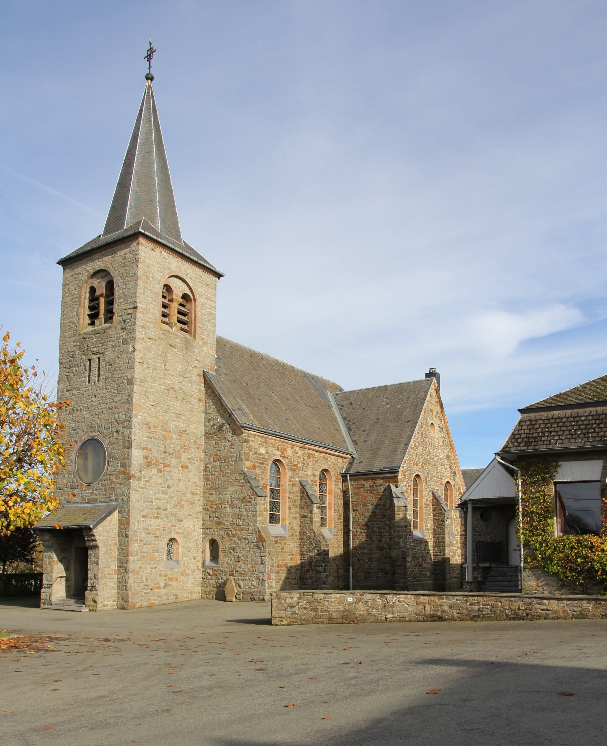 Kirche von Faymonvile, Weismes in Belgien, erbaut 1911